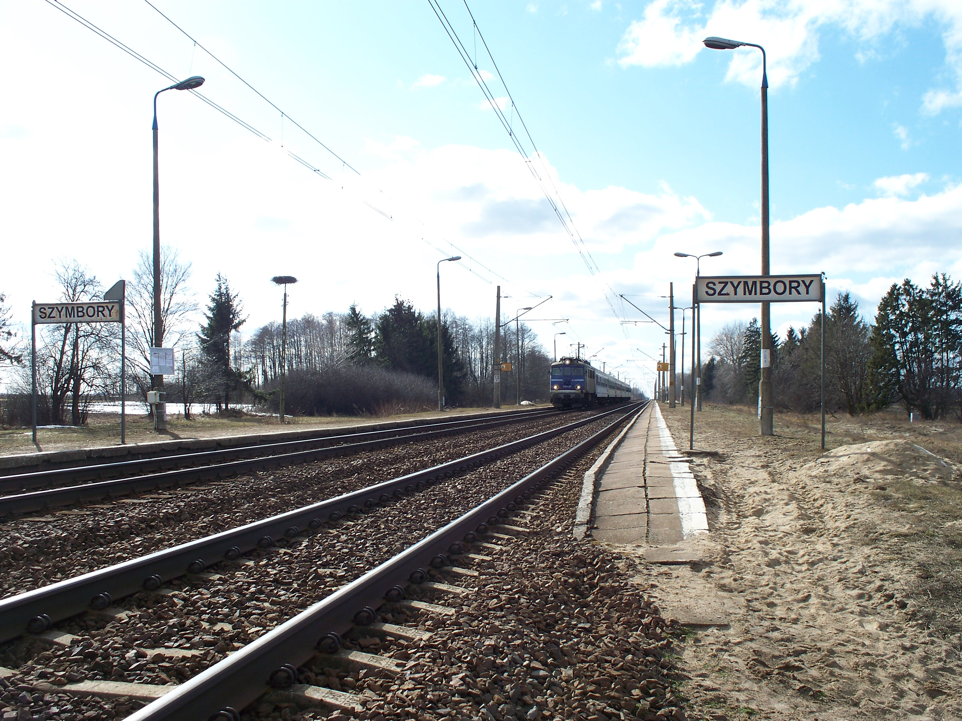 W tle pociąg TLK 51108 relacji Bydgoszcz Główna – Białystok EU07-229.